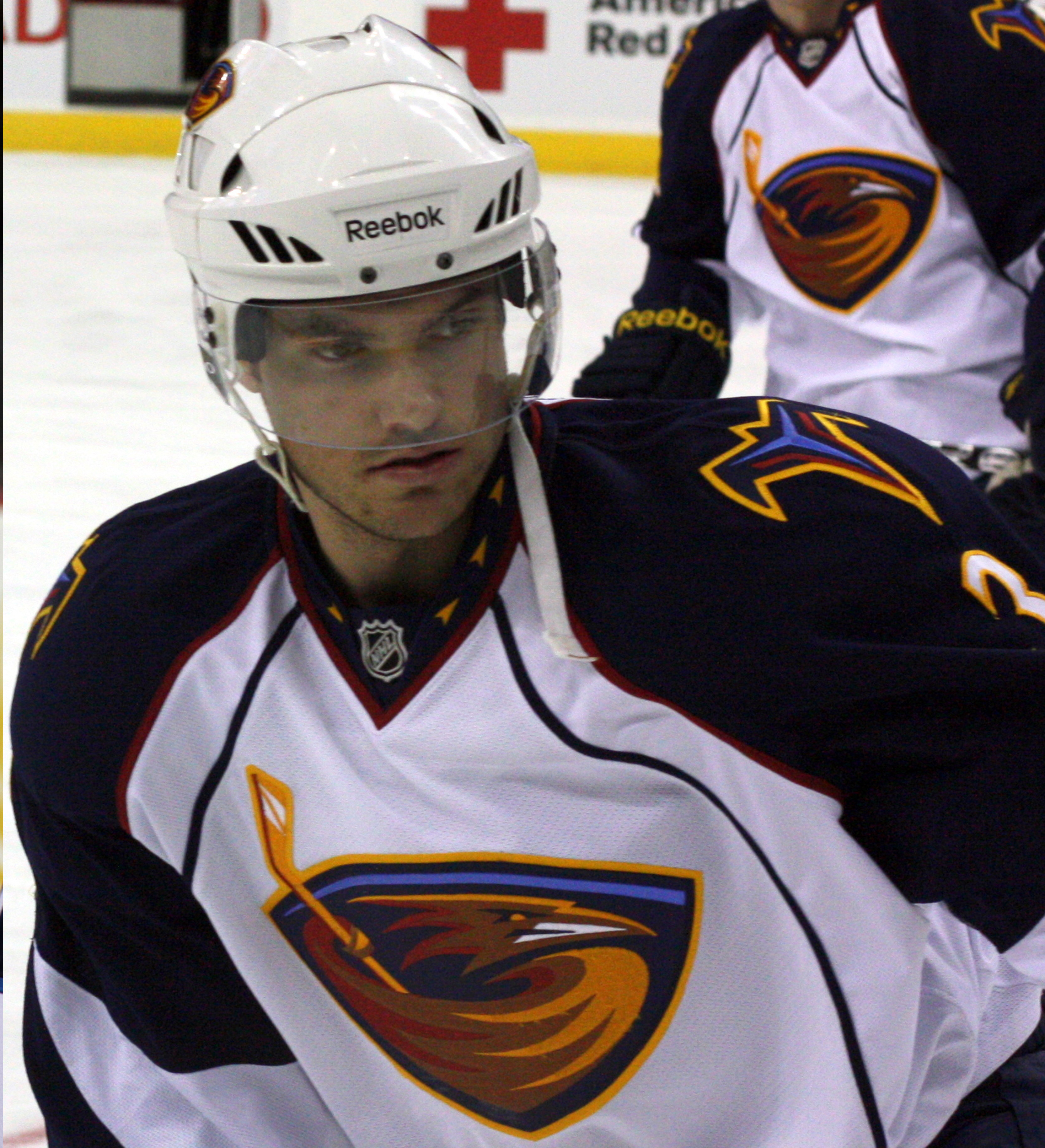 Noah Welch in March 2011.